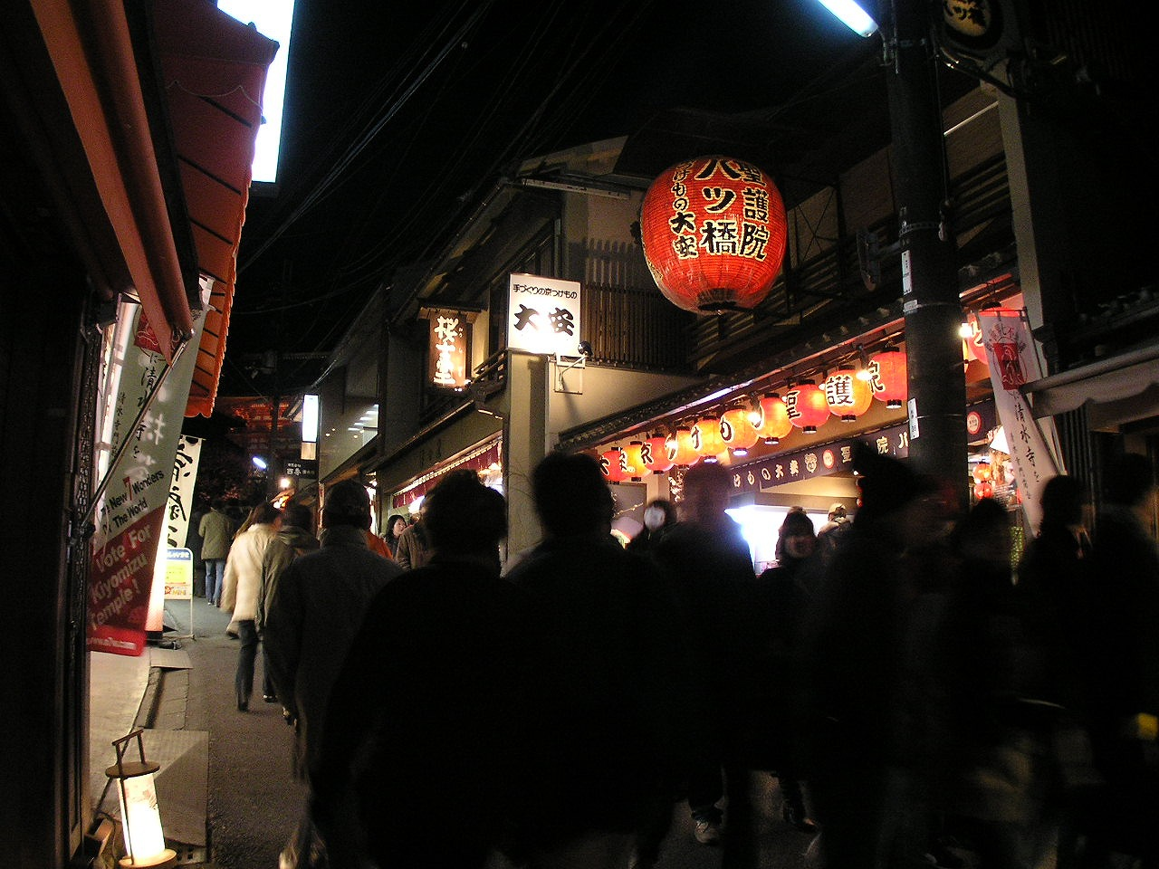 京都・東山花灯路清水坂